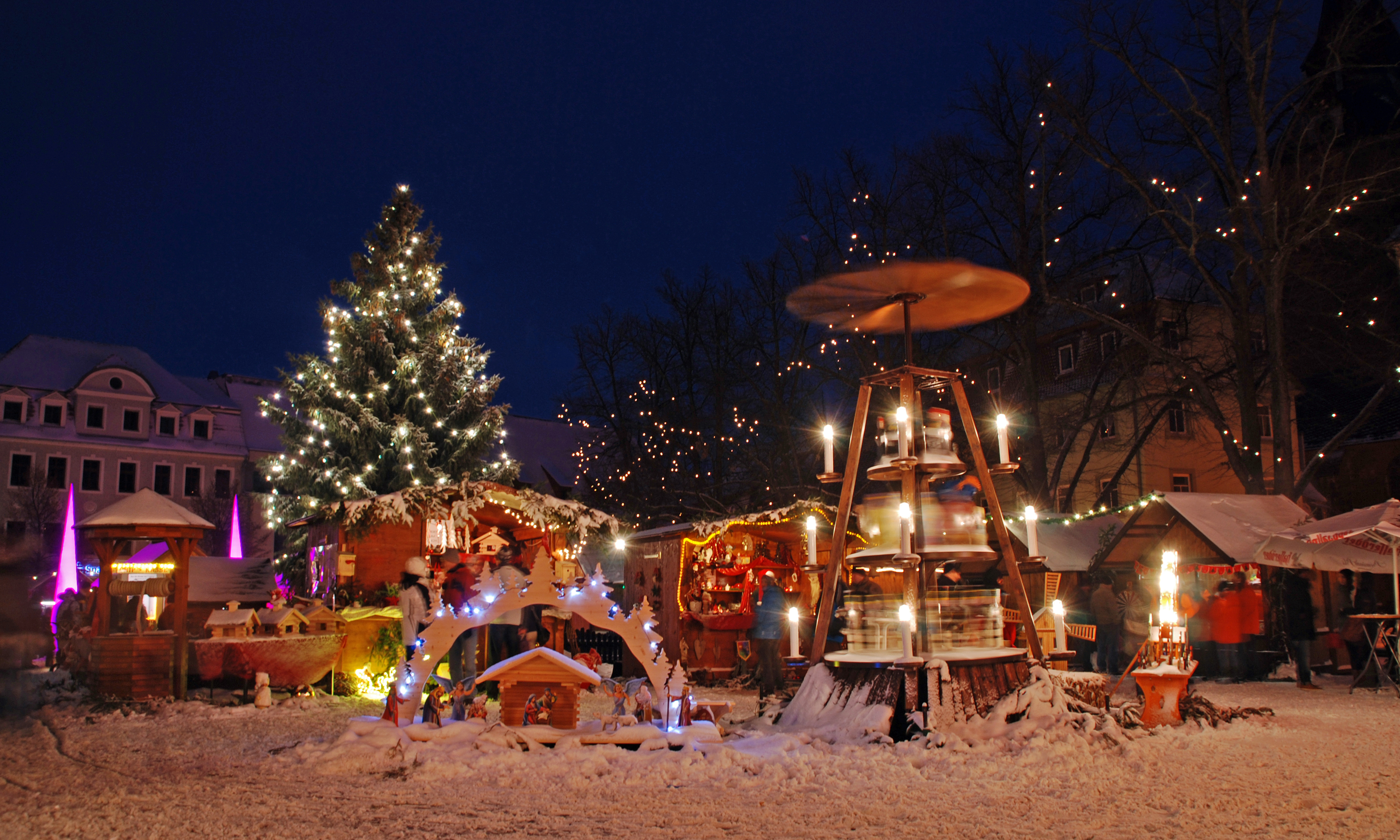 Adventsmarkt Delitzsch